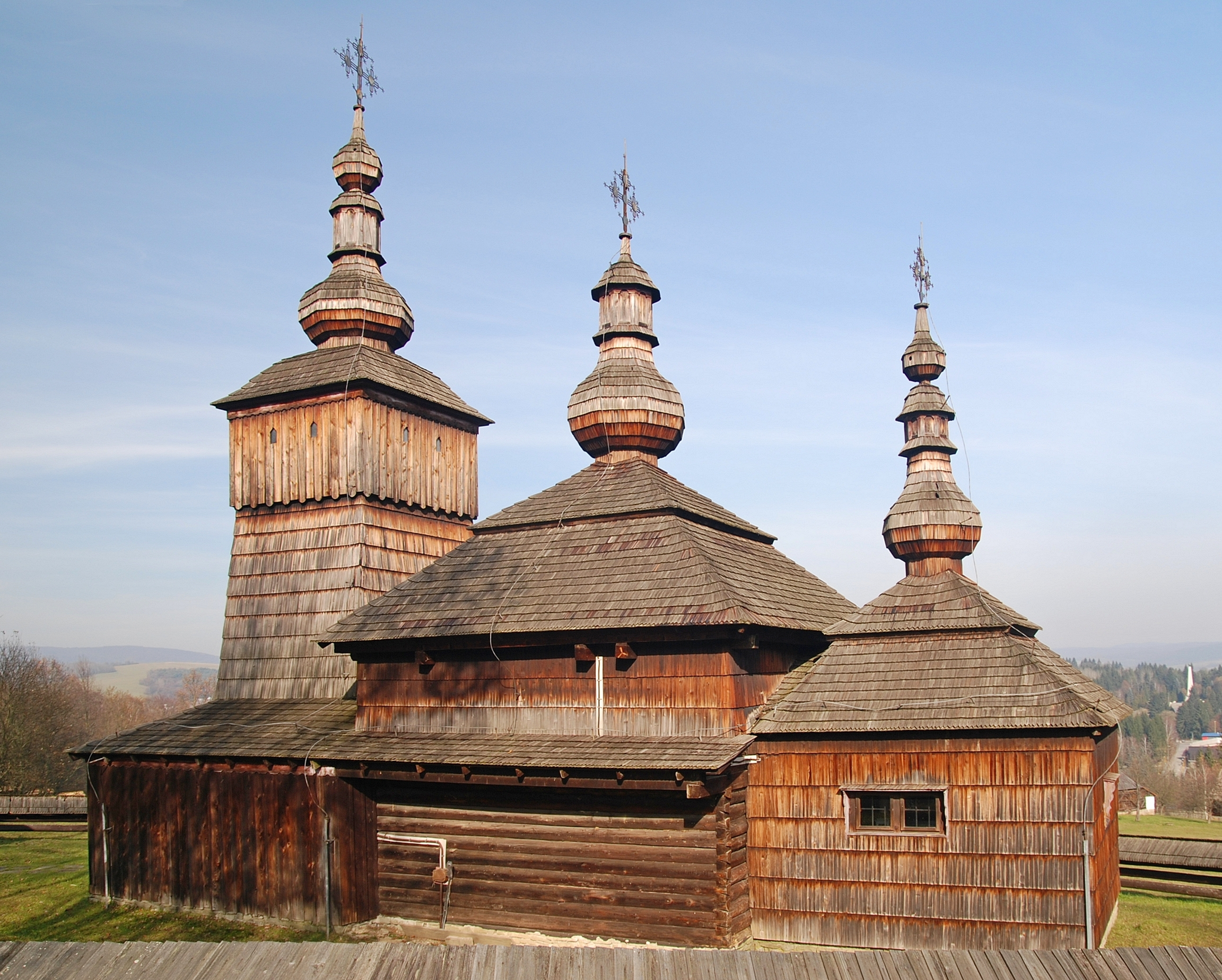 miato Svidník (skansen)